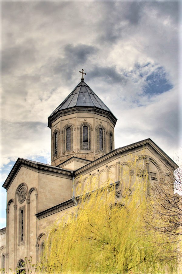 Tbilisi, Georgia